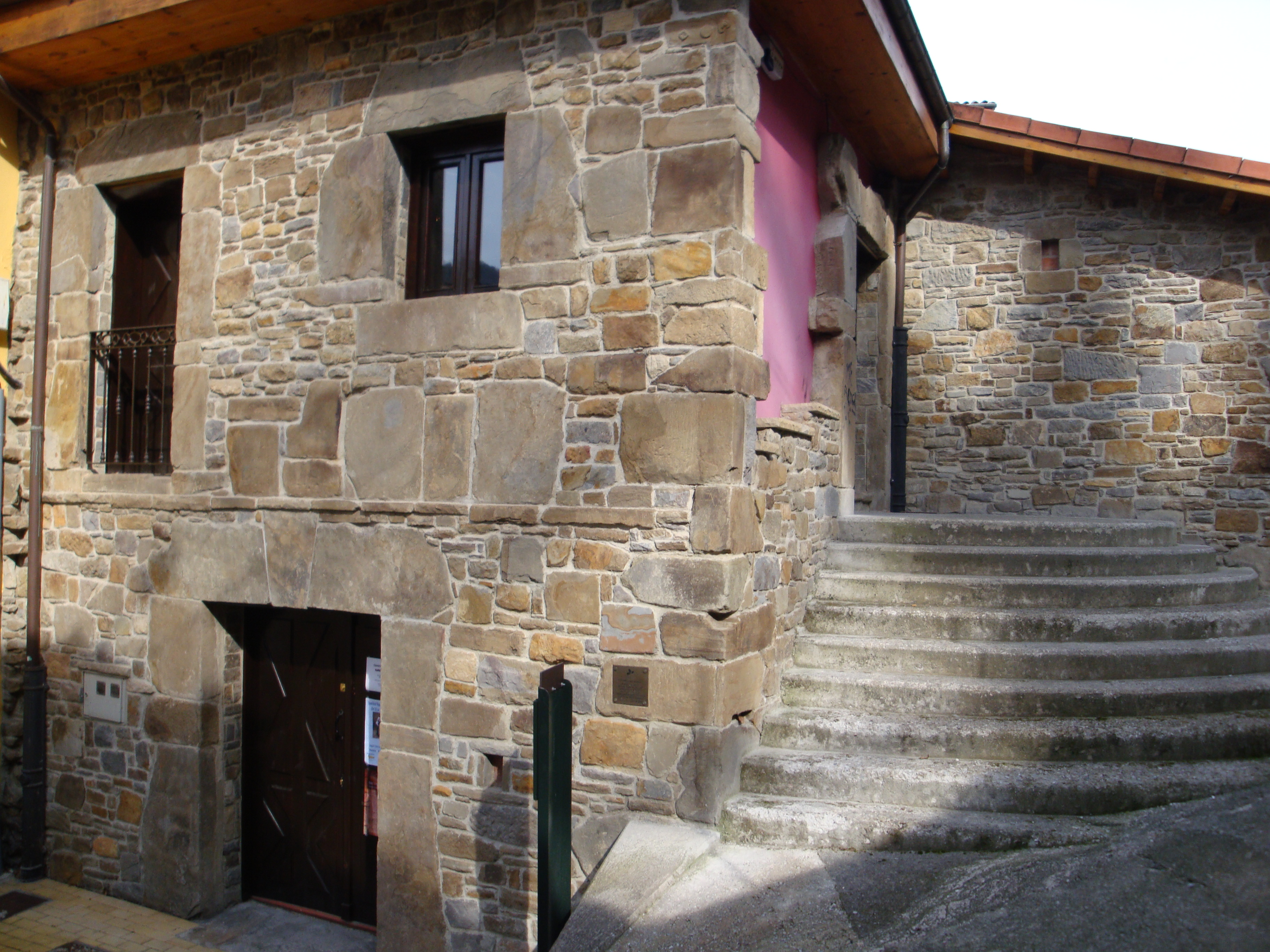 Fachada de la Casona del Bravial de Blimea